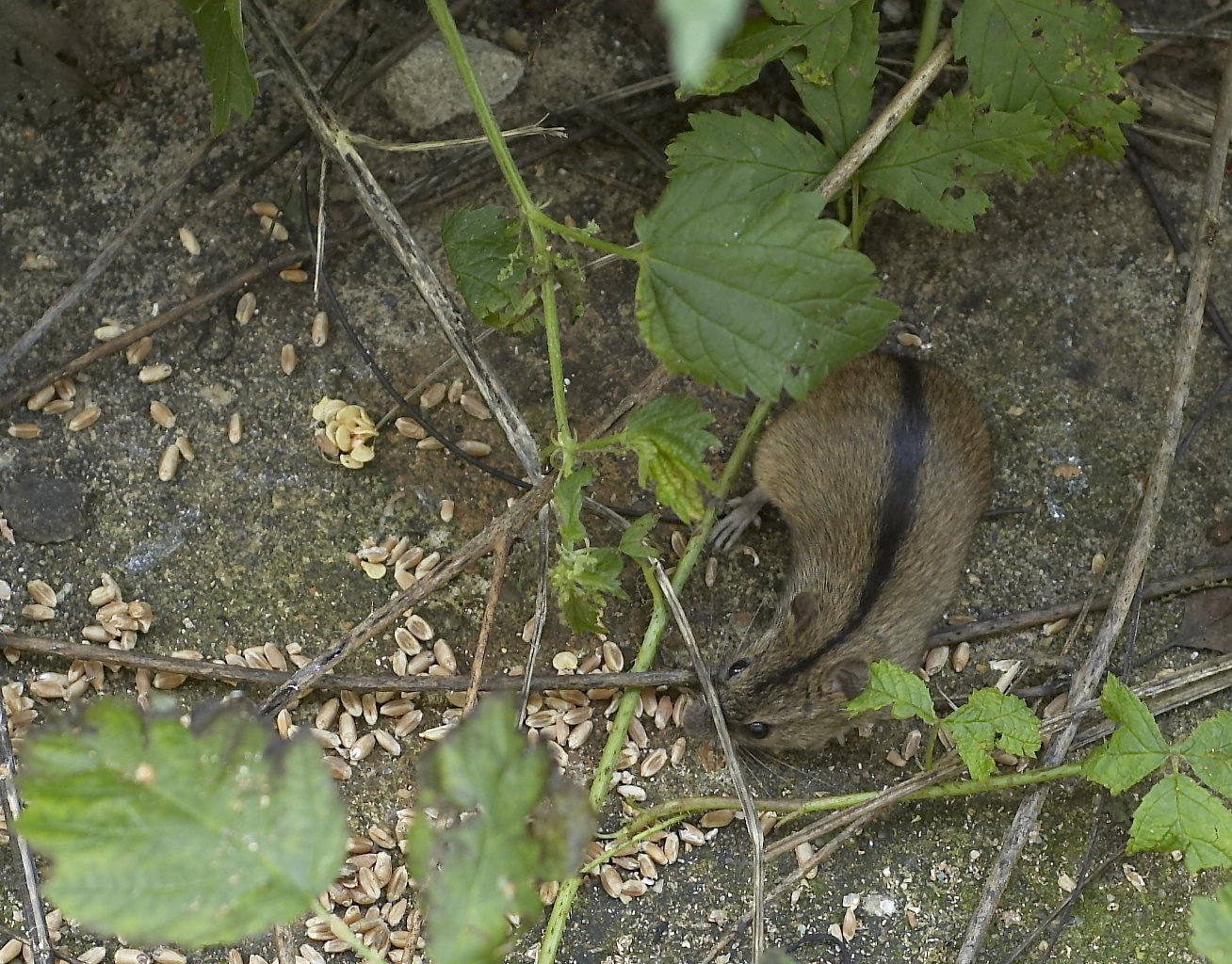 Mysz polna "Apodemus agrarius"